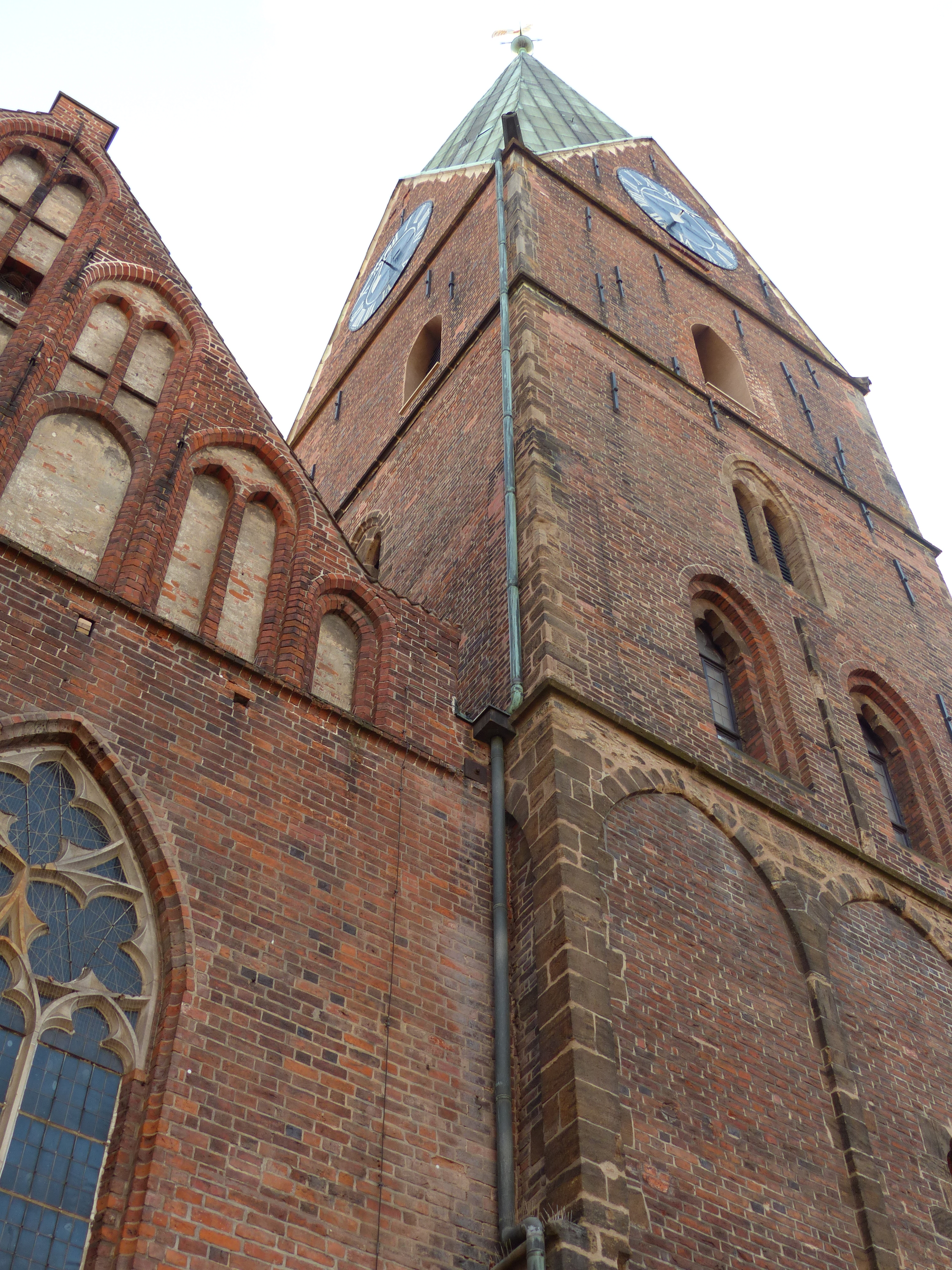 Martinikirche in der Bremer Altstadt, Turm von Osten mit angebauter Wand des nördlichen Seitenschiffs.